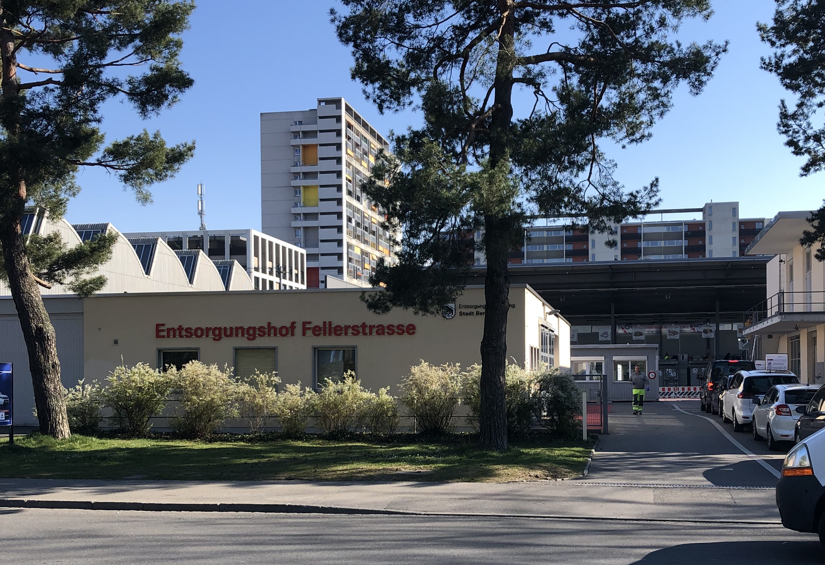 Tscharnergut: Entsorgungshof Fellerstrasse